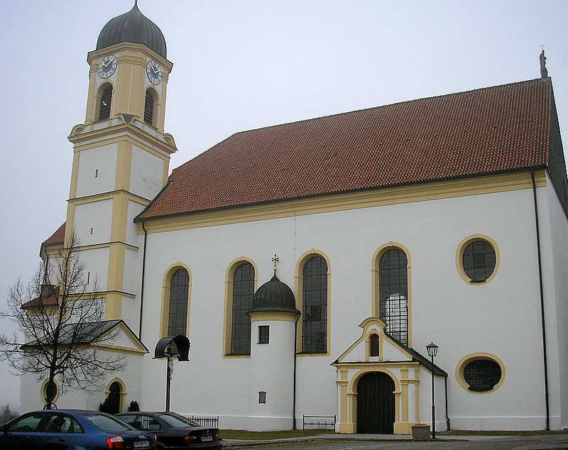 Pfarrkirche St. Nikolaus (Bernbeuren, Landkreis Weilheim-Schongau, Oberbayern). Gesamtansicht. Eigene Aufnahme, Feb. 2007 / Parish church St. Nikolaus (Bernbeuren, Upper Bavaria, Germany). Total view. Own photo, Feb. 2007